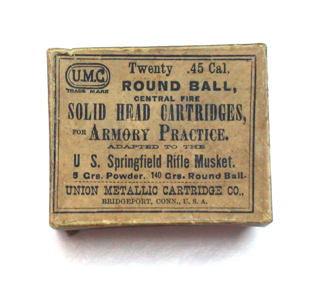 Patronenschachtel für .45-70 Übungspartonen